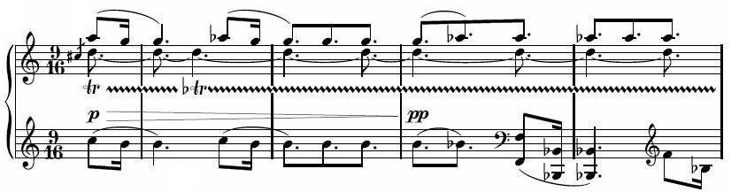 Description : cinquième variation de l'arietta de la sonate pour piano n° 32 de Beethoven Auteur : propre travail réalisé avec Lilypond Licence : Domaine public (auteur décédé depuis plus de 70 ans)